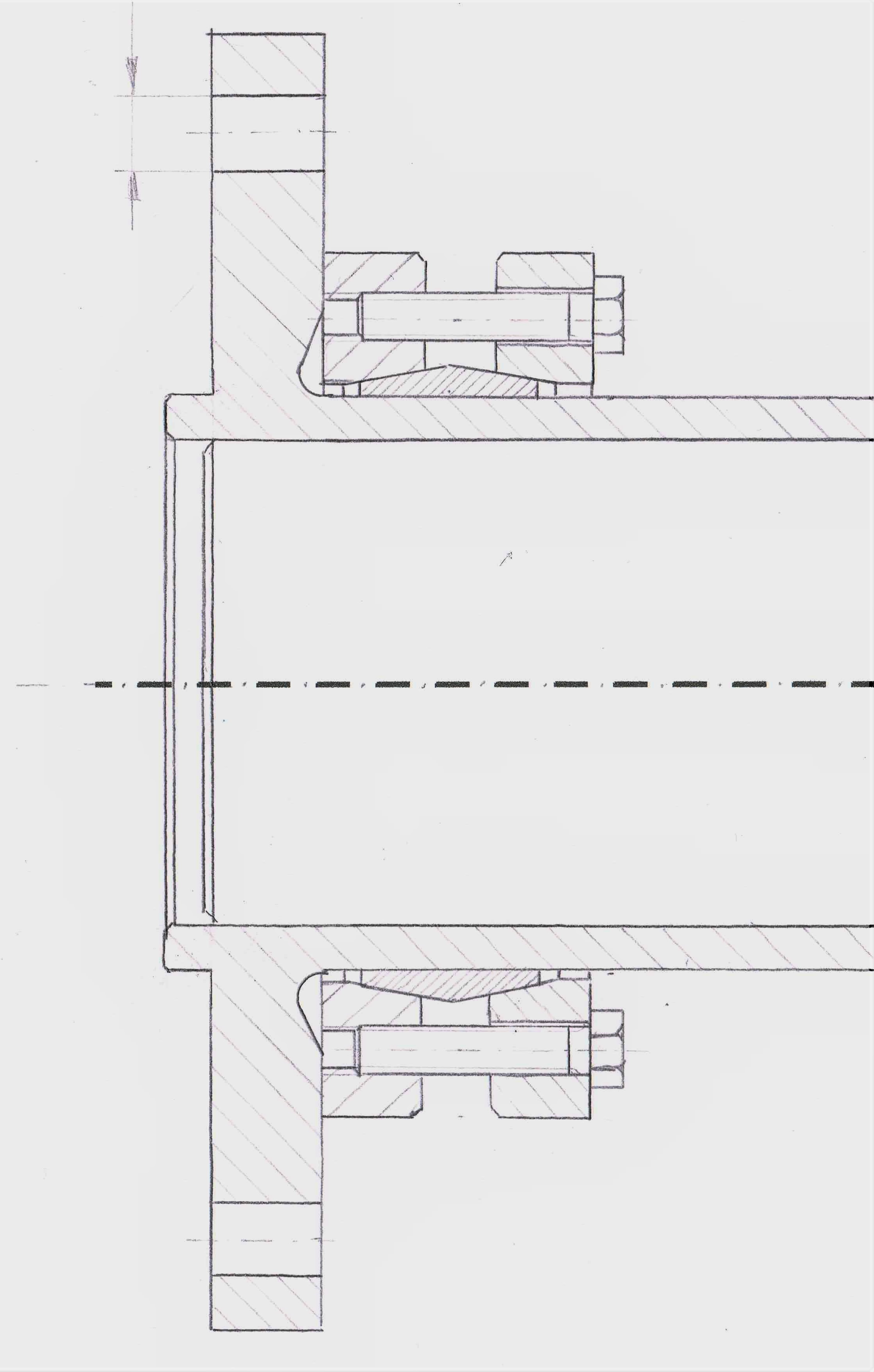 Handzeichnung einer Schrumpfscheibe auf einem Flansch.